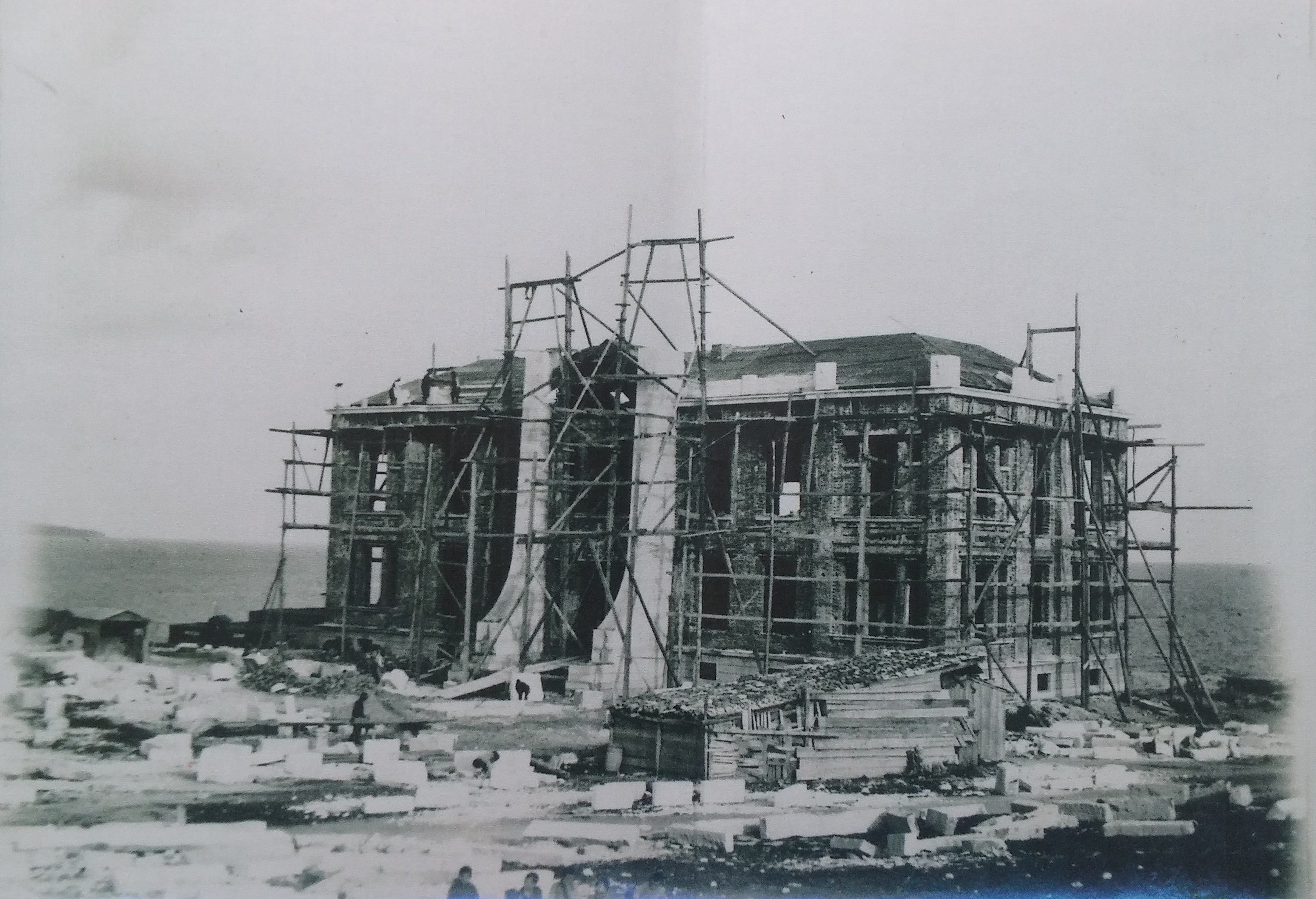 Варна. Аквариума.